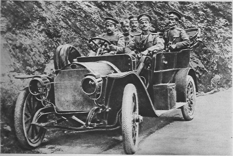 Le_commandement_montenégrin_avec_un_prince se déplaçant en automobile